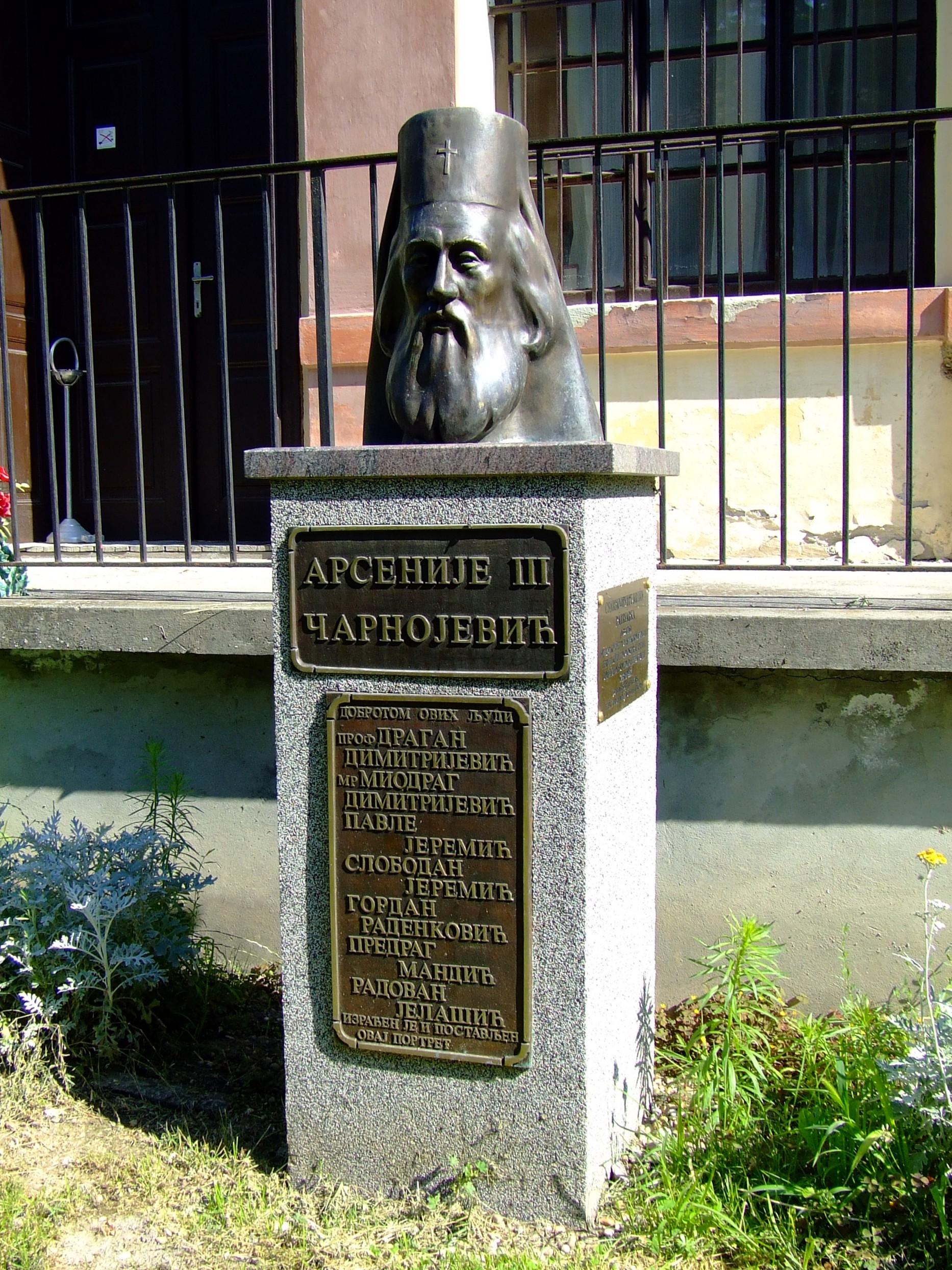 Csarnojevity Arzén (1633-1706) pátriárka szobra a dunaszekcsői szerb templom kertjében